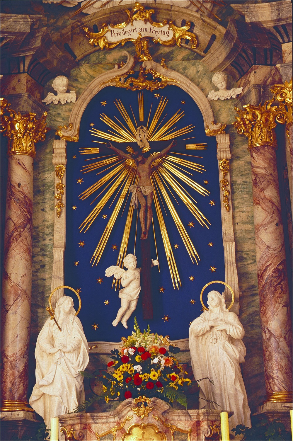 Wallfahrtskirche Heiligkreuz. das Altarkreuz